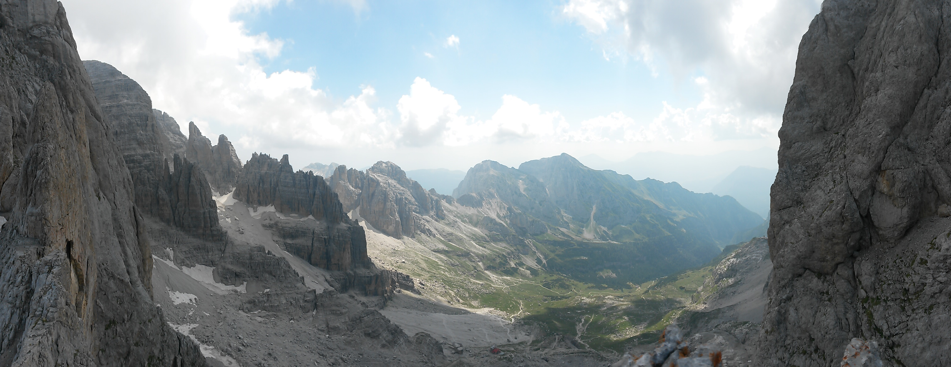 Vista della Val d'Ambiez dalla vetta dei Due Denti, poco sopra l'omonima Bocchetta